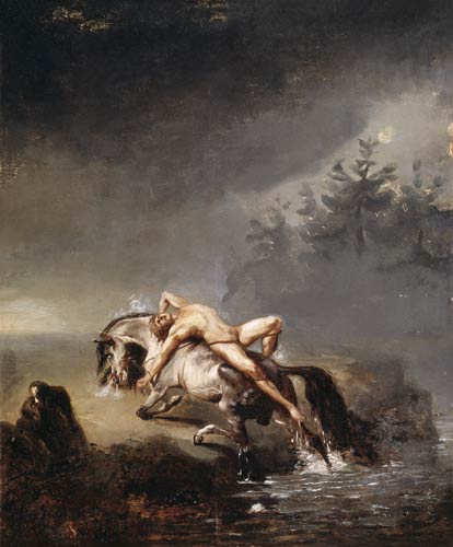 Mazepa